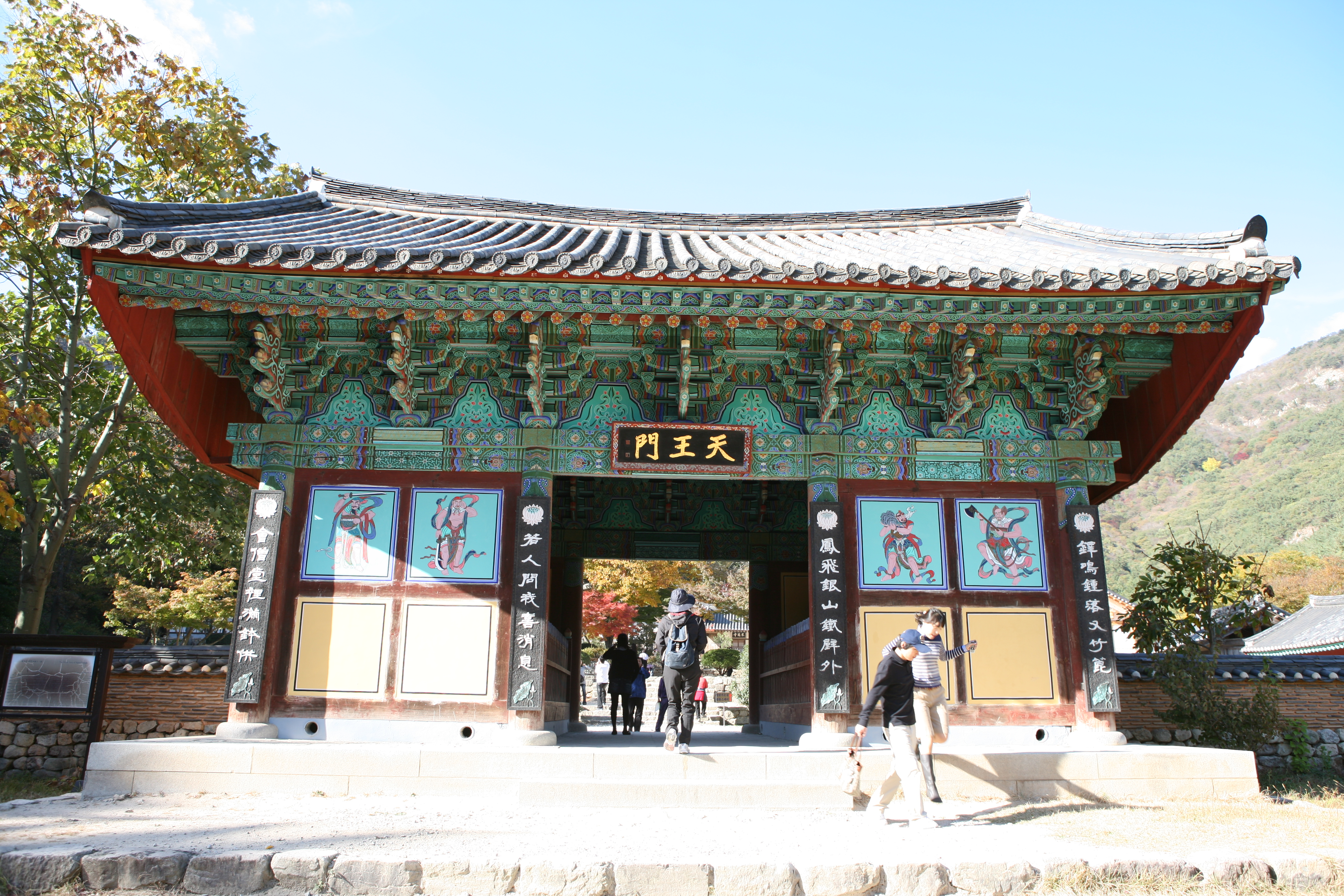 Naesosa-Cheonwangmun